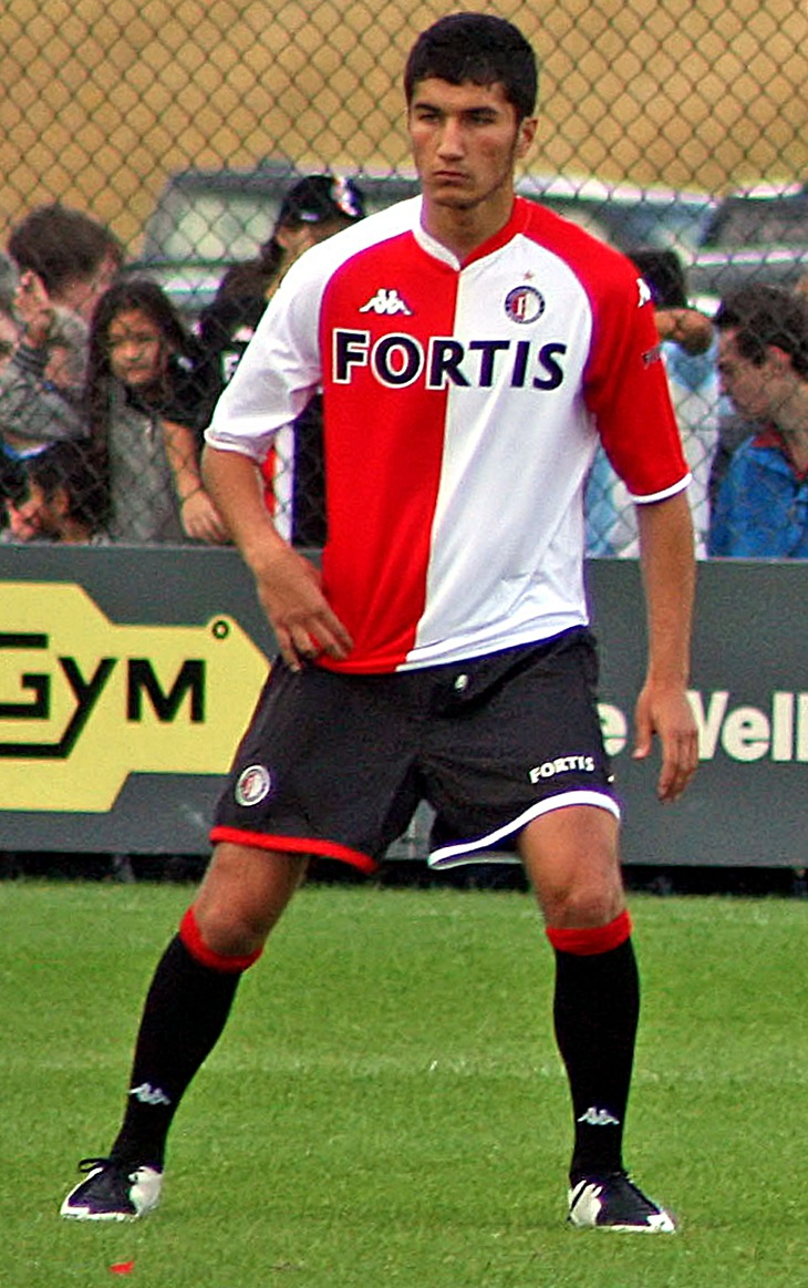 Nuri Sahin (Feyenoord)